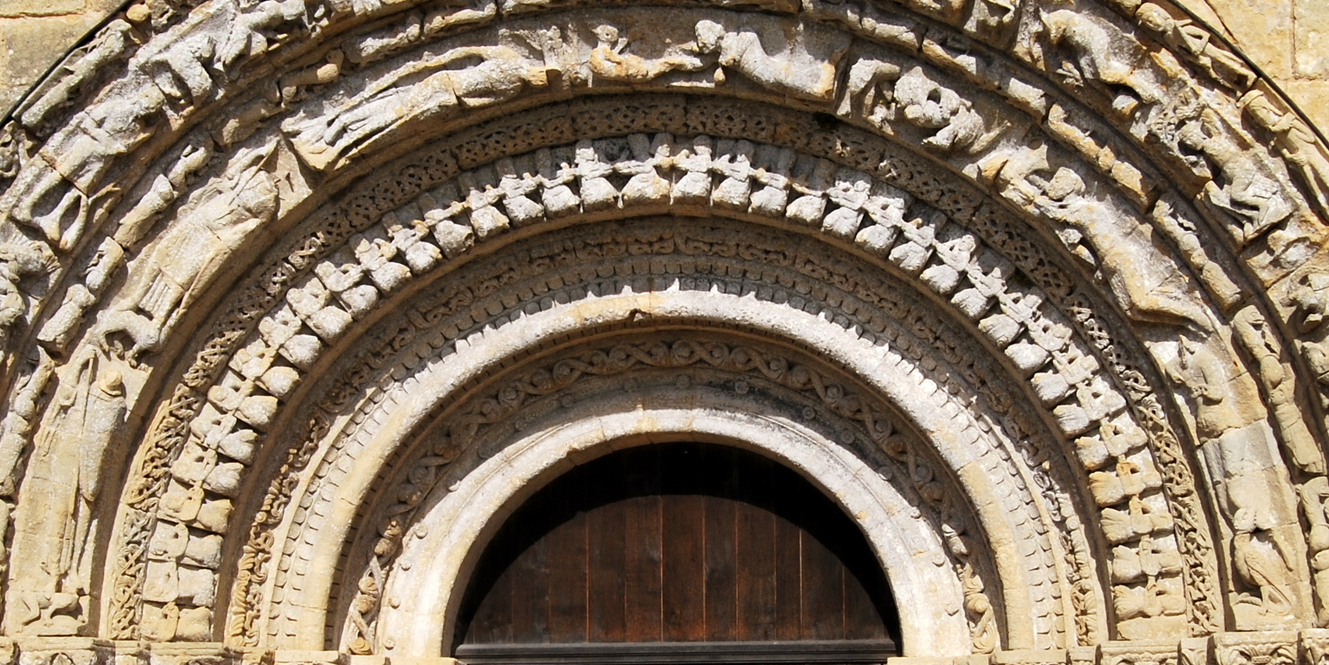 Détail du portail